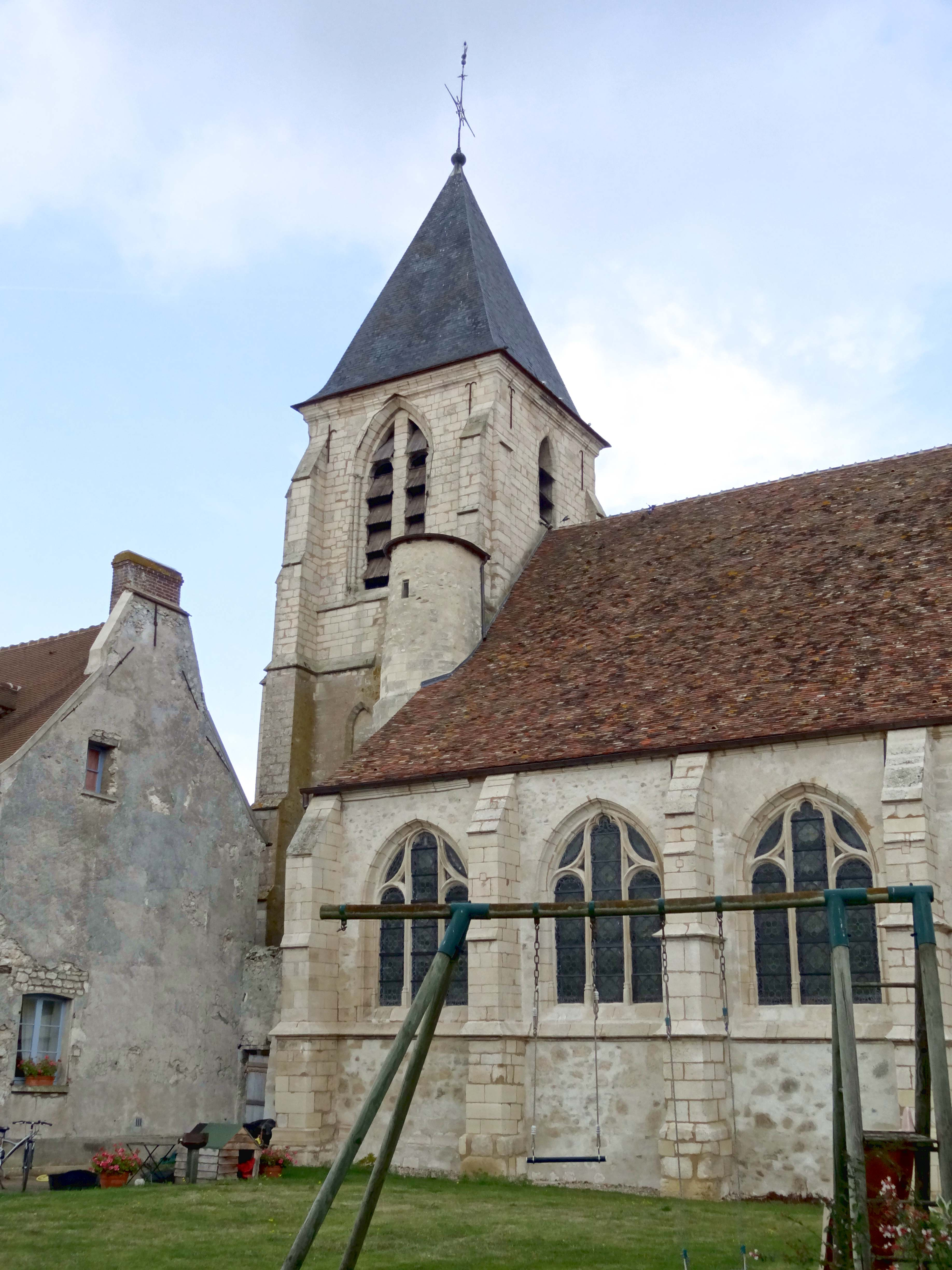 Vue partielle depuis le sud-est.